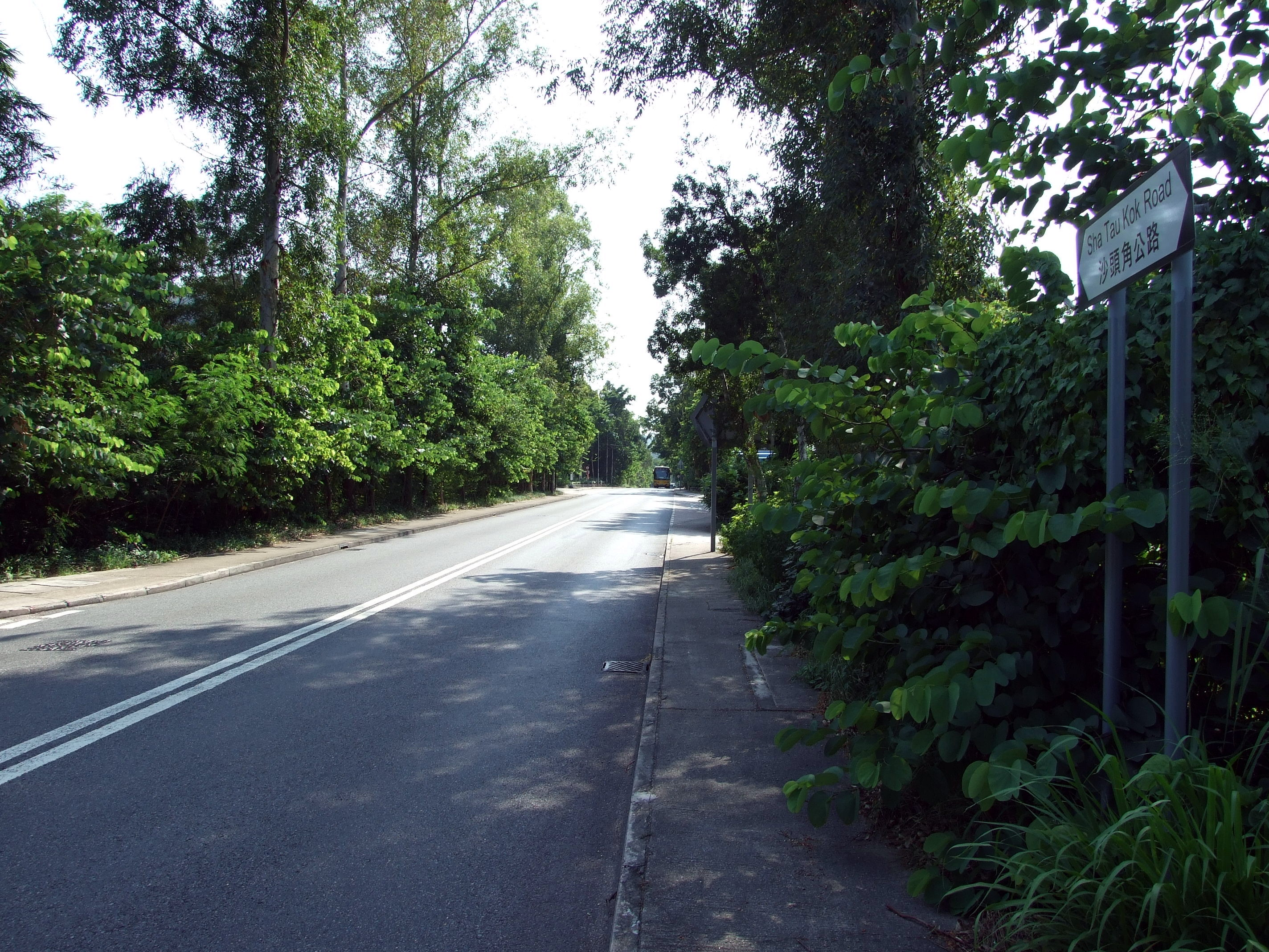 中文（香港）: 沙頭角公路石涌凹段